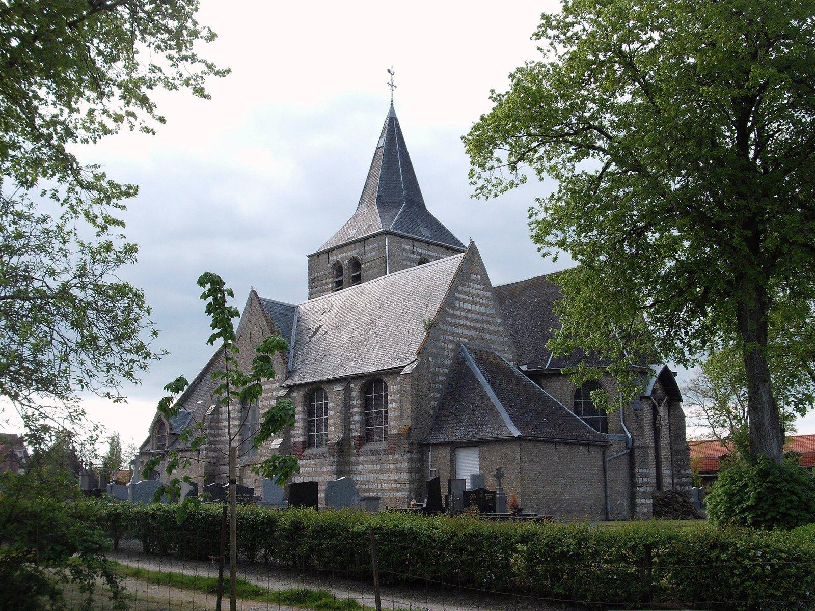 Eringhem